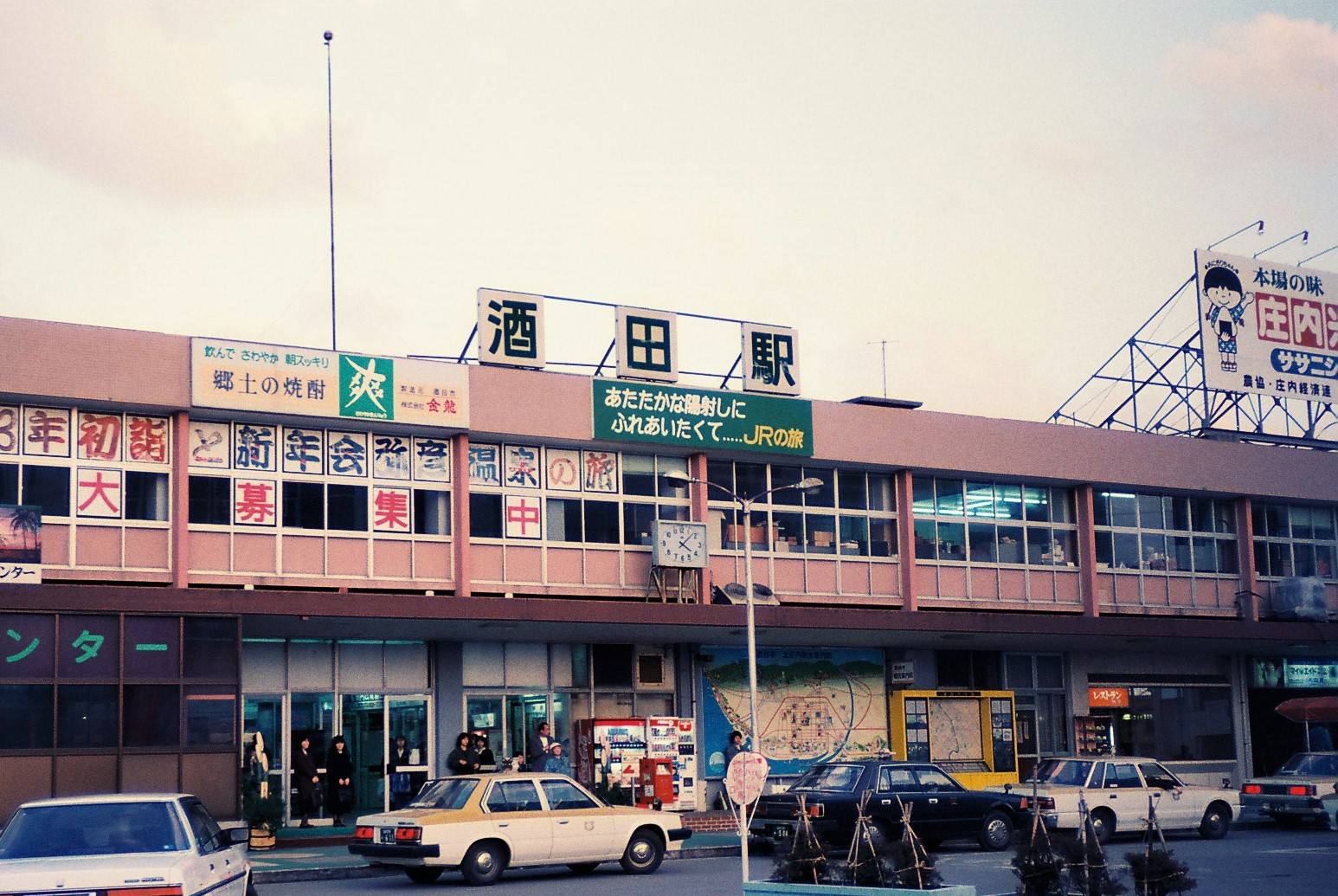 羽越本線酒田駅（1987年12月撮影）